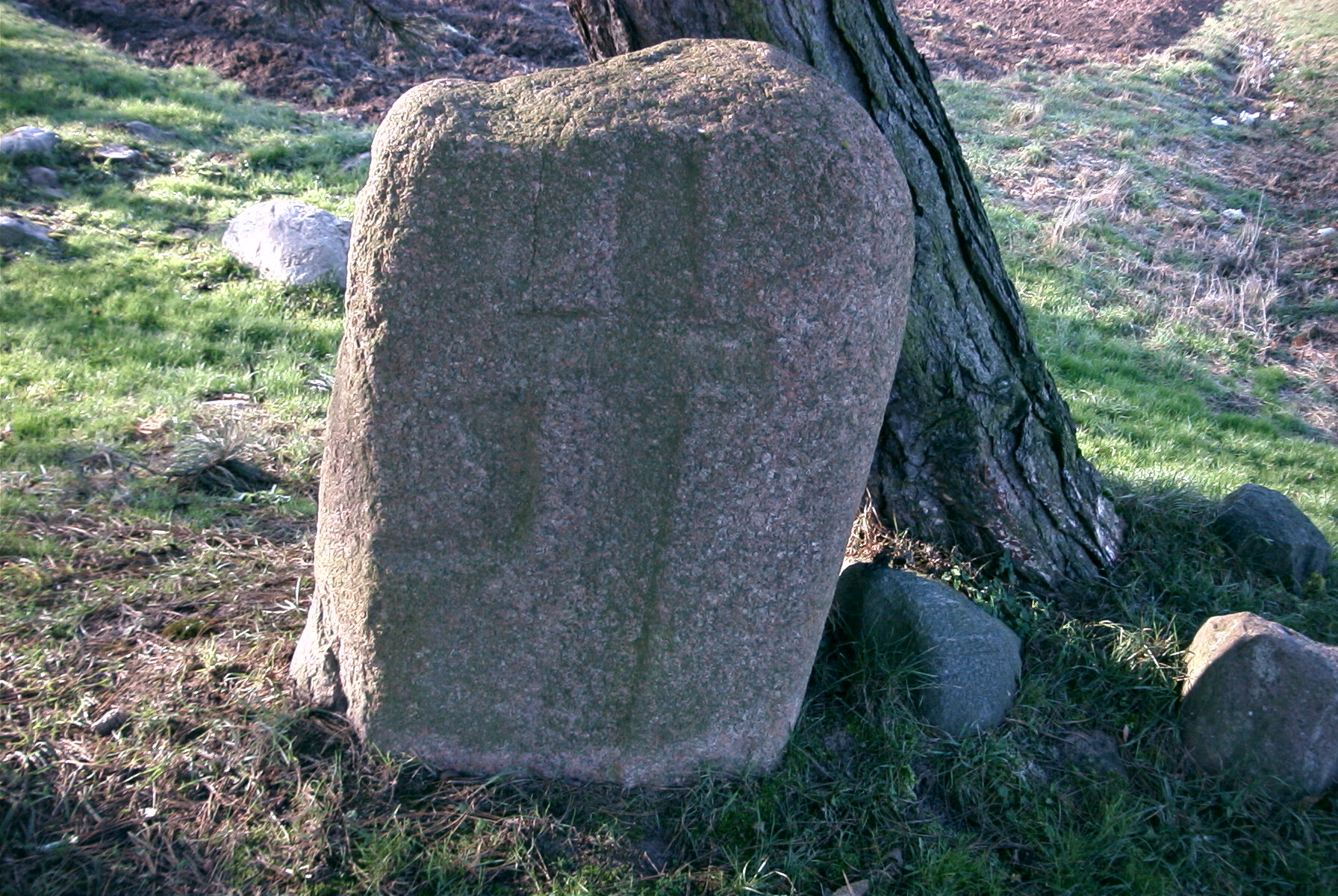 Wartislaw-Stein Grüttow Symbolseite, Kreuz und Trinkhorn